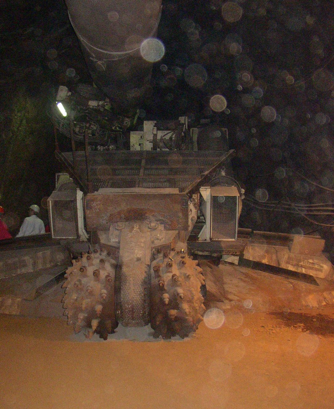 Einlagerungsschacht für die geplante Endlagerung von schwachen- und mittelradioaktiven Müll. Die Maschine fräst die neuen Tunnel und schafft gleichzeitig den Abraum nach hinten.